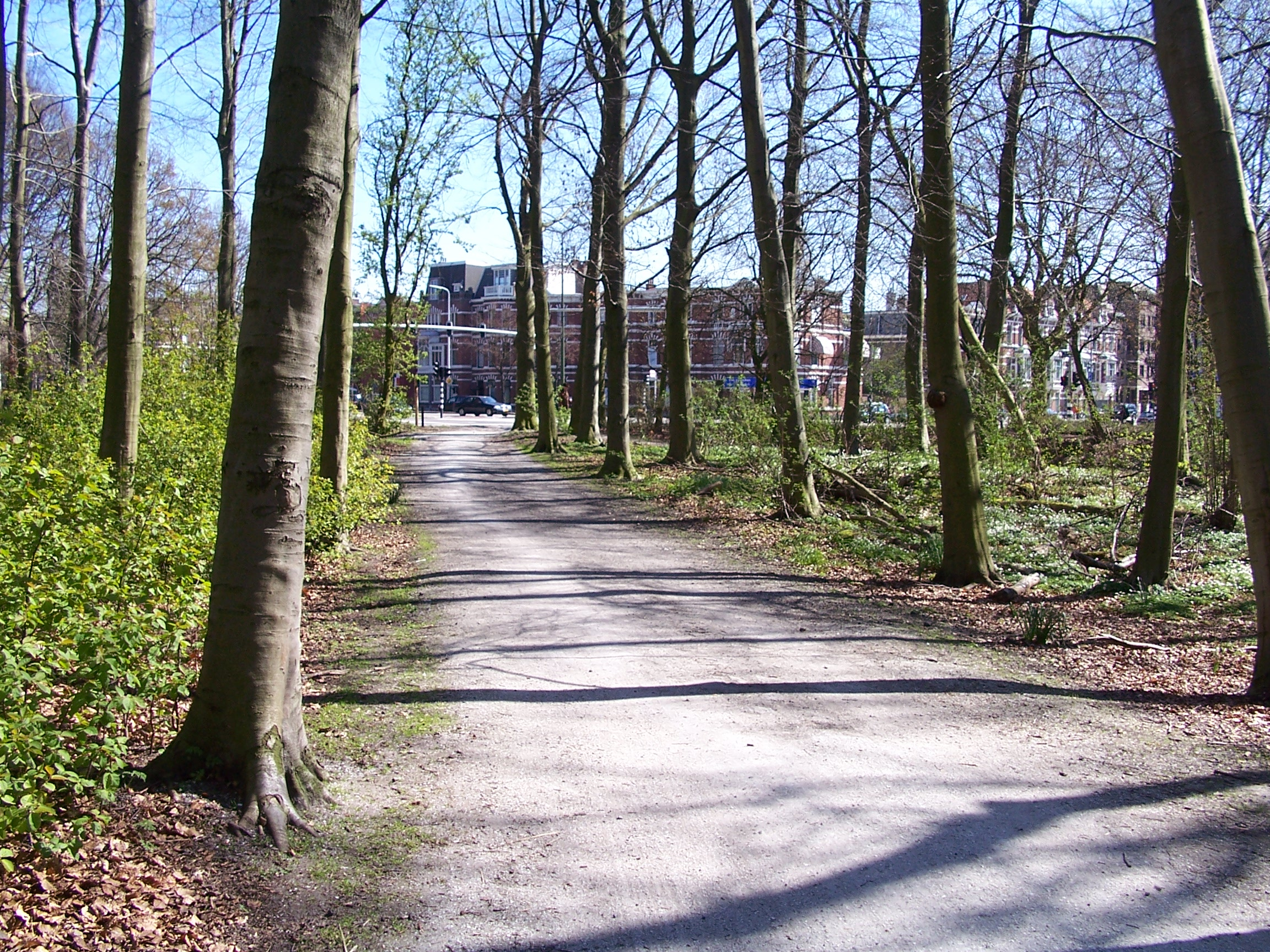 Haagse Bos, The Hague/Den Haag